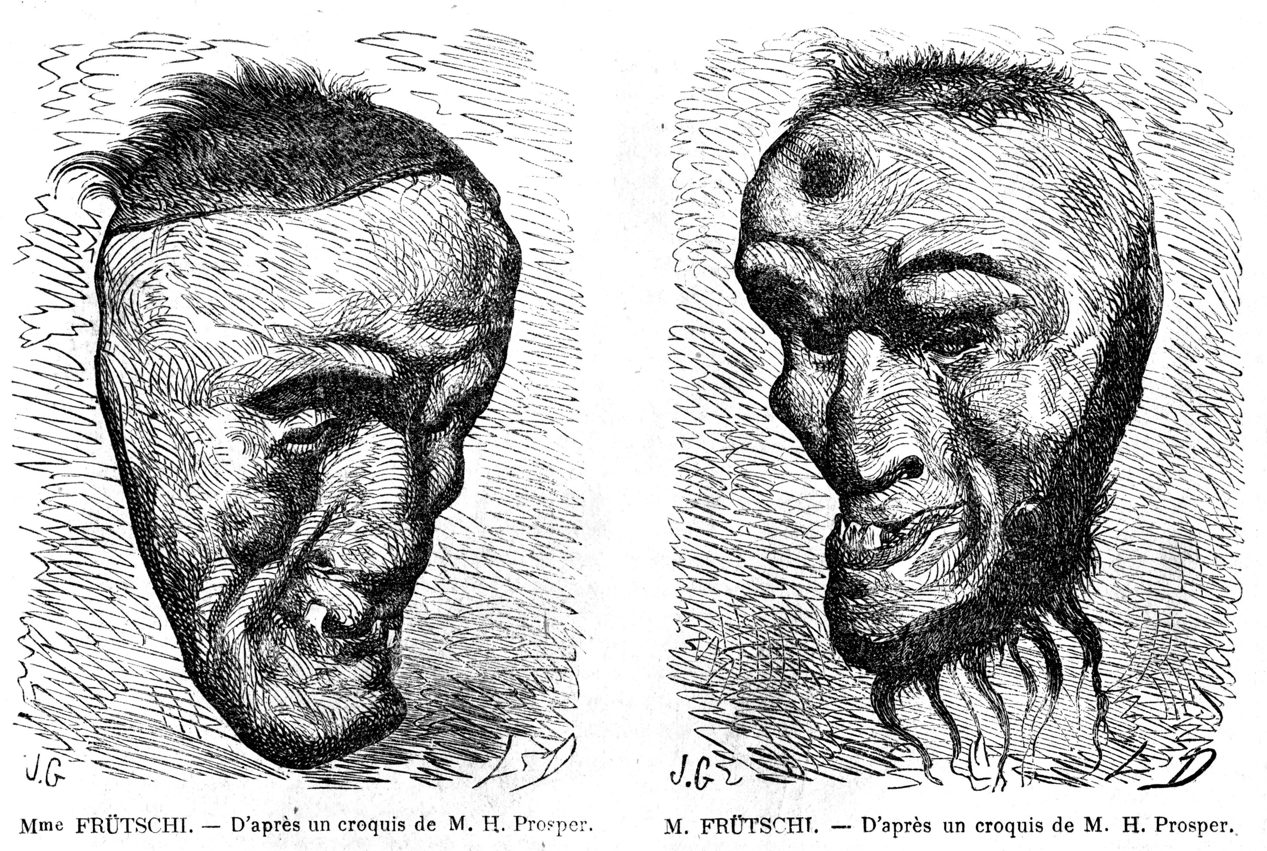 L'Illustration 1862 gravures Masques de Mme et Mr Frütschi, dans les archives de la Societé des Frütschi